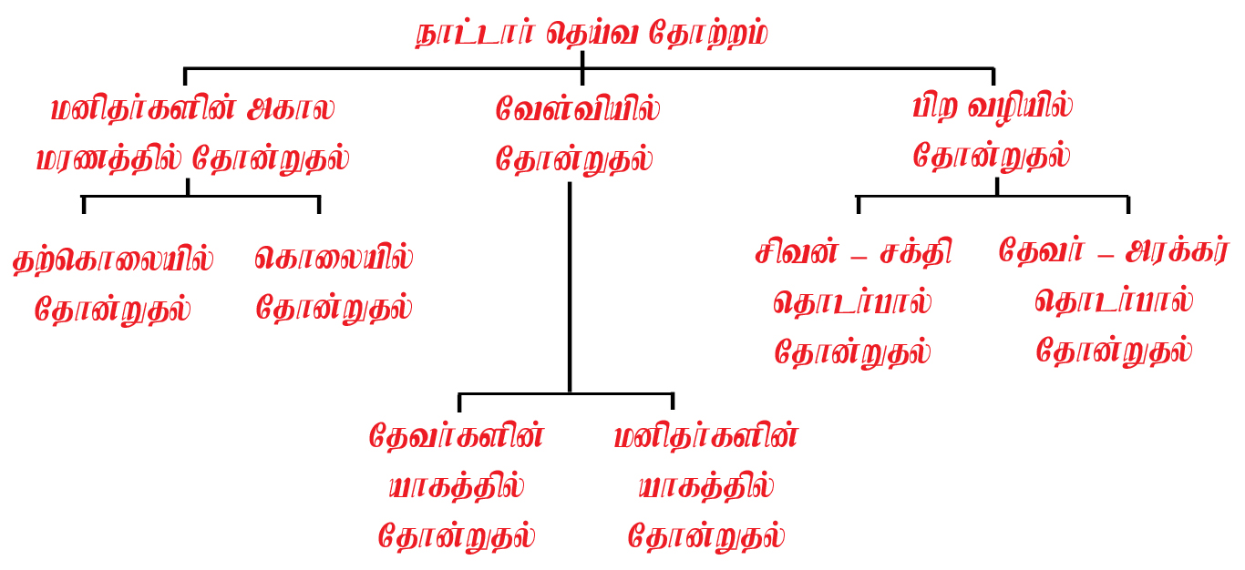 நாட்டார் தெய்வத் தோற்றம் பற்றிய படிமம்